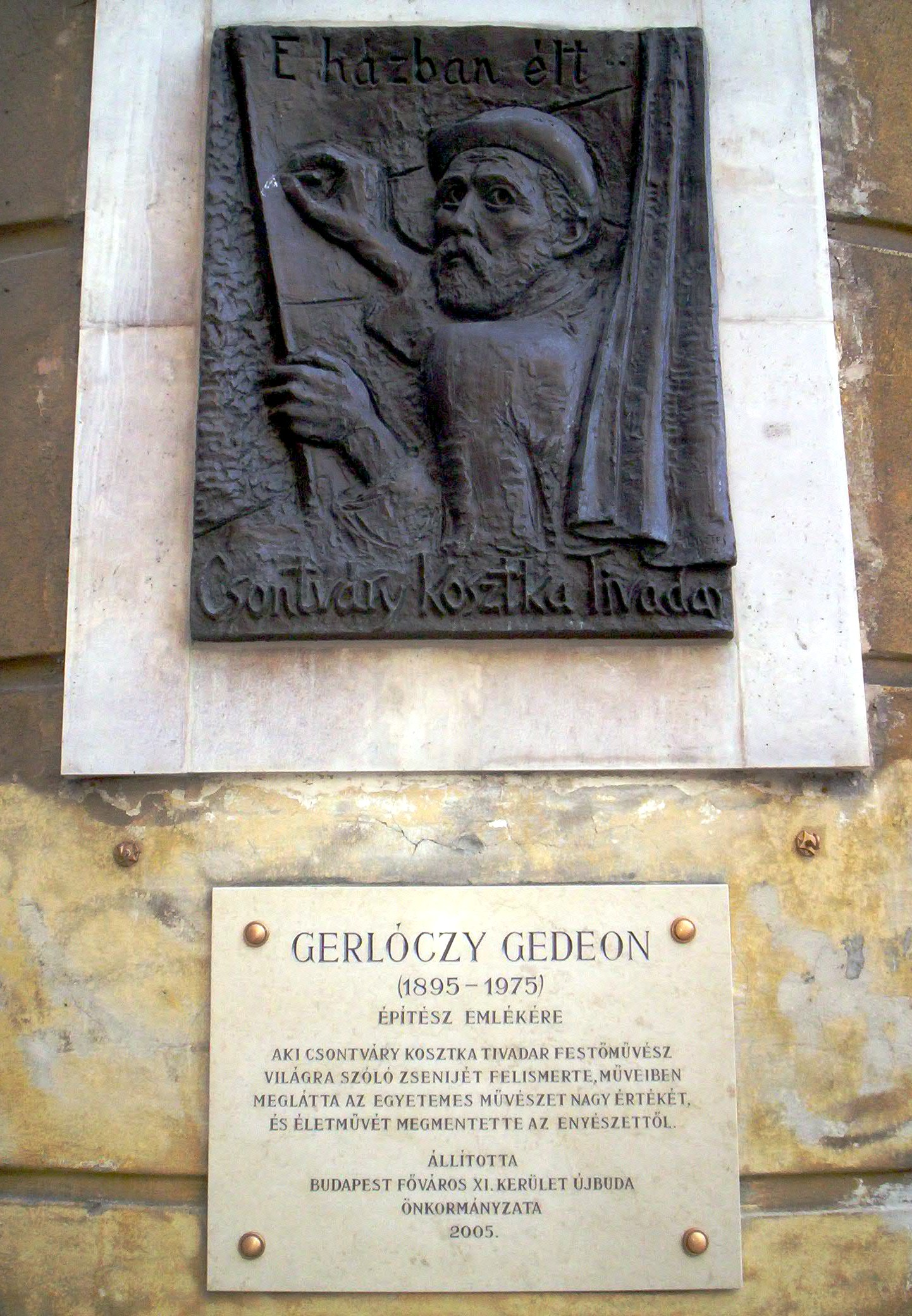 Csontváry Kosztka Tivadar és Gerlóczy Gedeon emléktáblája Budán. A dombormű Lisztes István alkotása (1976)